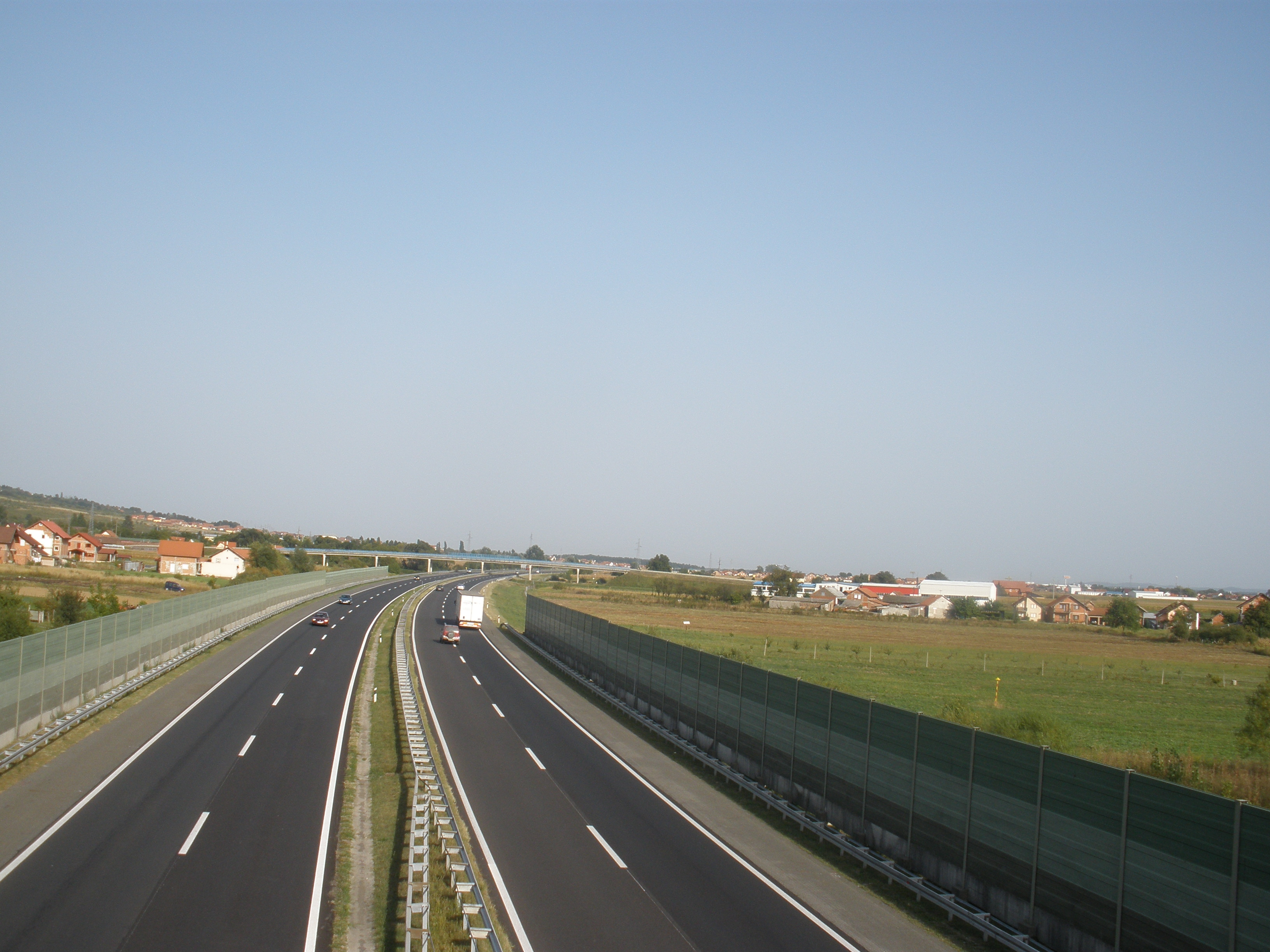 Autocesta Zagreb - Lipovac u Slavonskome Brodu.